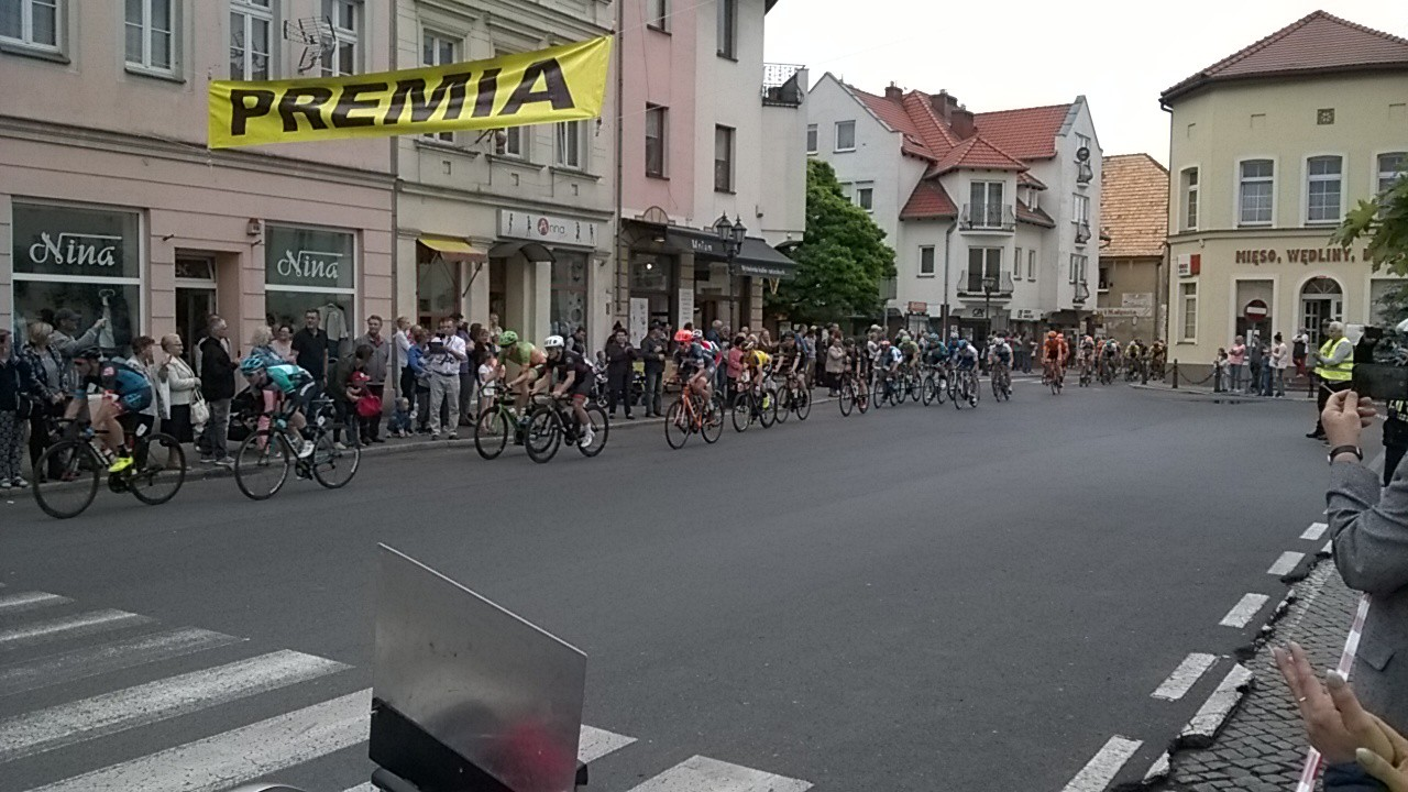 Premia lotna w Sulechowie podczas 2. etapu wyścigu Bałtyk-Karkonosze Tour 2018